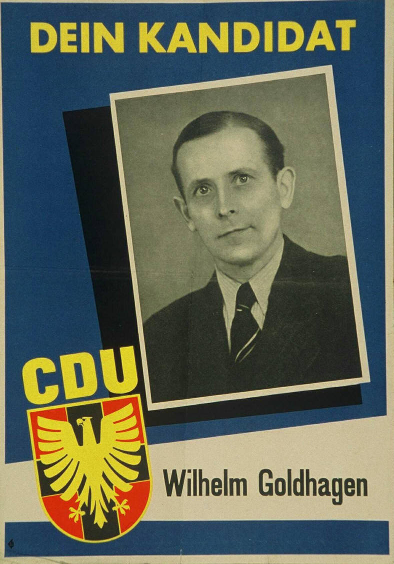 Dein Kandidat Abbildung: Porträtfoto Plakatart: Kandidaten-/Personenplakat mit Porträt Objekt-Signatur: 10-001: 381 Bestand: Plakate zu Bundestagswahlen (10-001) GliederungBestand10-18: Plakate zu Bundestagswahlen (10-001) » Die 2. Bundestagswahl am 6. September 1953 » CDU » Mit Porträtfoto Lizenz: KAS/ACDP 10-001: 381 CC-BY-SA 3.0 DE